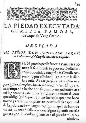 Reproducción digital a partir de Decimaoctaua parte de las Comedias de Lope de Vega Carpio, En Madrid, por Iuan Gonçalez, a costa de Alonso Perez, 1623, ff. 158-183r. Localización: Biblioteca Nacional (España). Sig. R-14111.